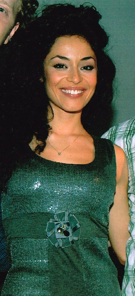 Opera propria